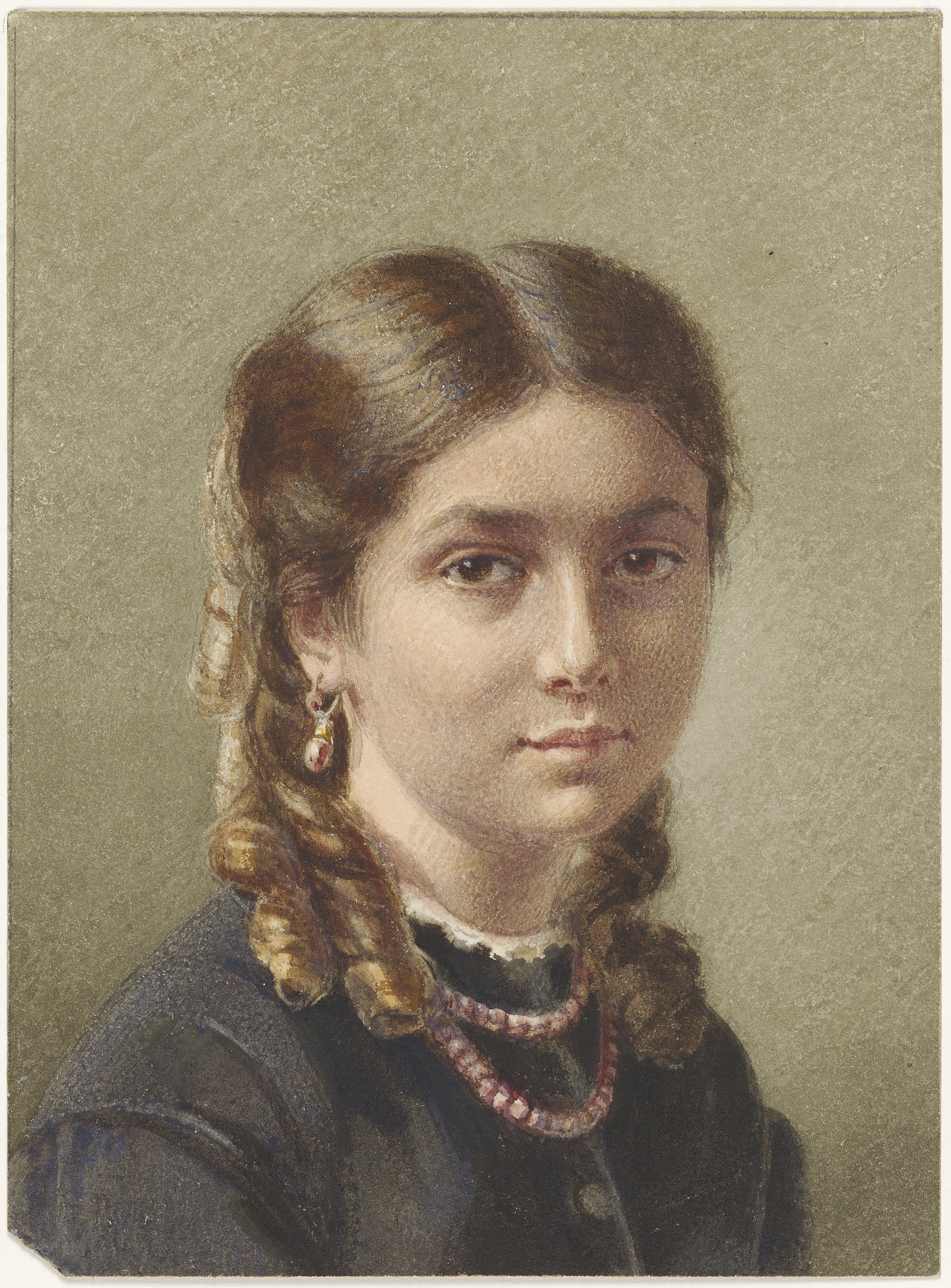 Marie Exner, verh. von Frisch